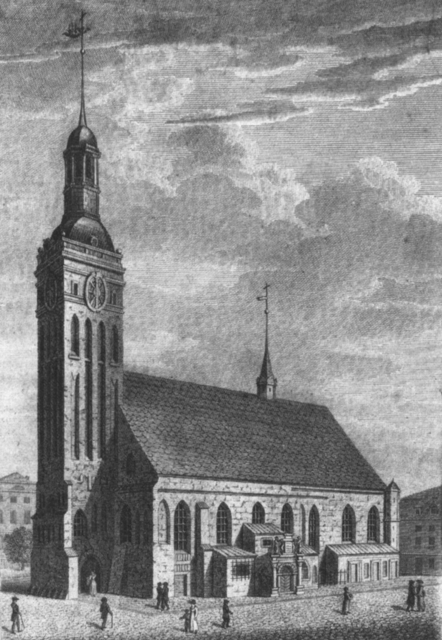 Altstadtkirche - гравюра 1829 г.